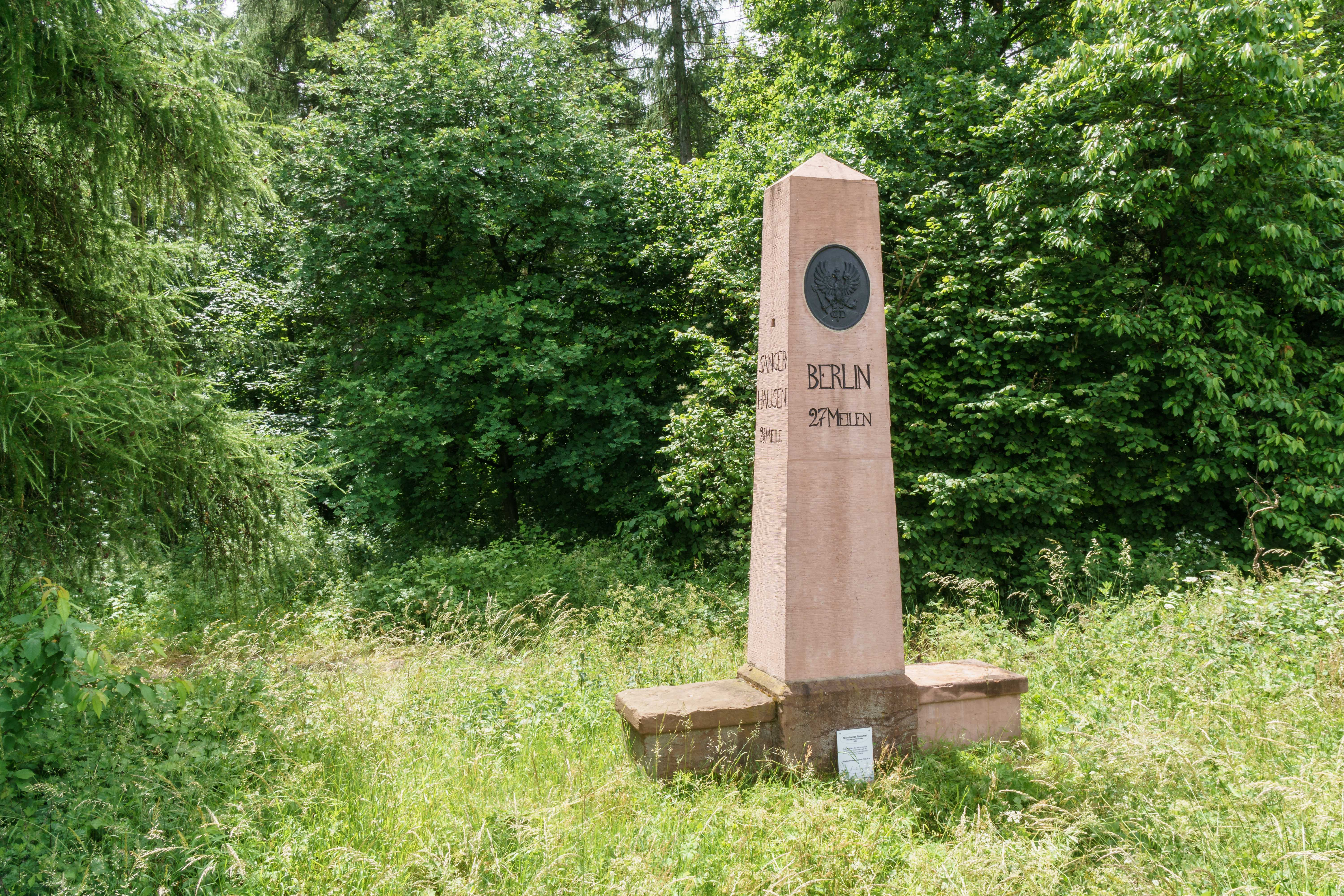 Preußischer Ganzmeilenobelisk mit Sitzbank an der L 151 zwischen Blankenheim und Wimmelburg. Inschrift: BERLIN 27 MEILEN ; EISLEBEN ½ MEILE ; SANGERHAUSEN 2 1/8 MEILE